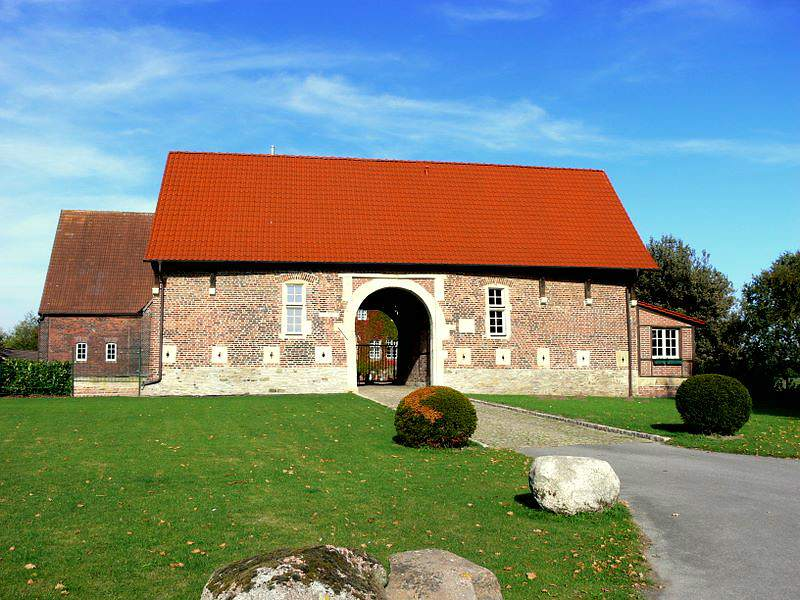 Haus Romberg, Vorburg